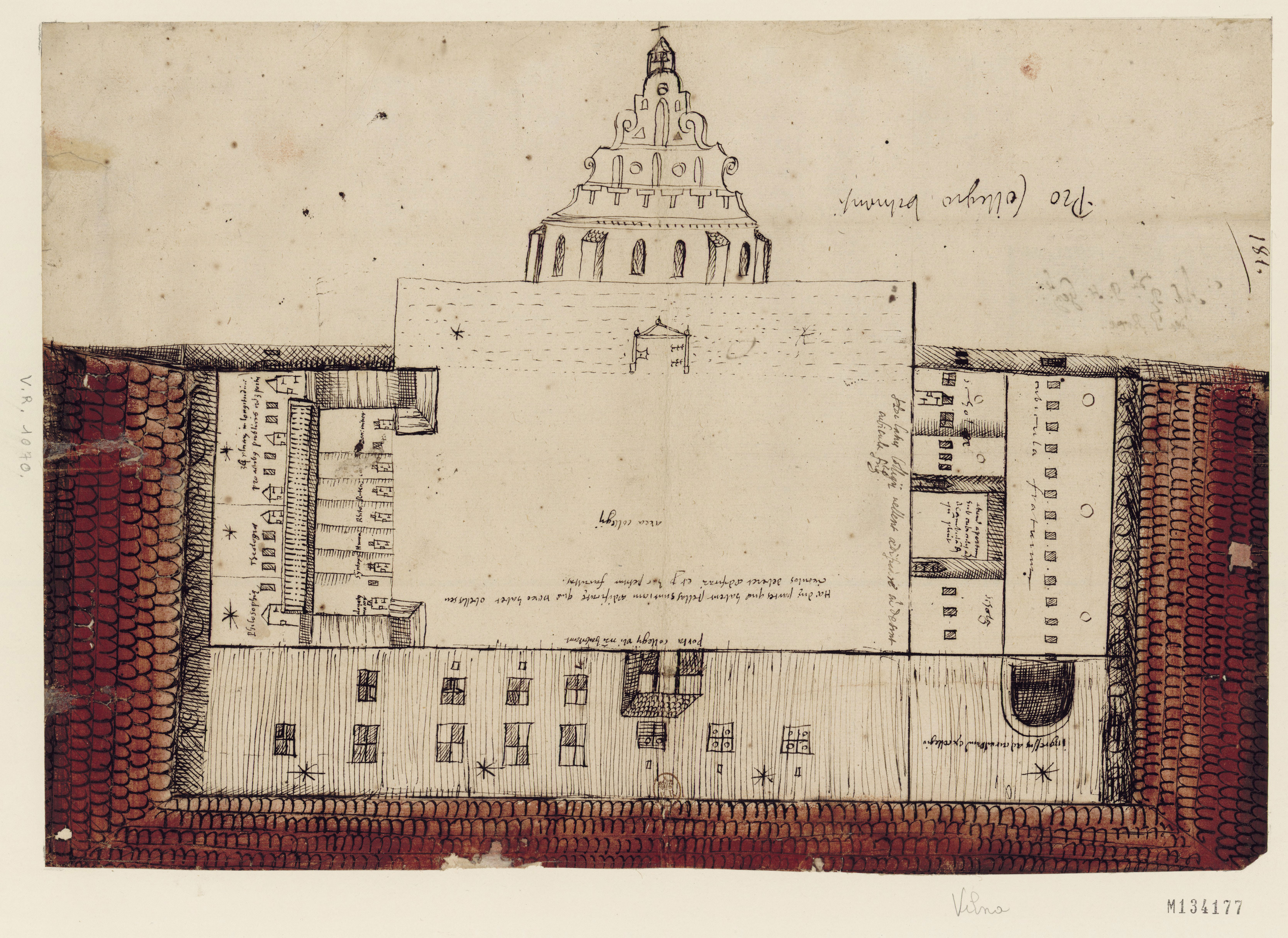 Беларуская (тарашкевіца): Вільня (Vilnia), Вялікі Двор (Vialiki Dvor). Плян Віленскага ўнівэрсытэту